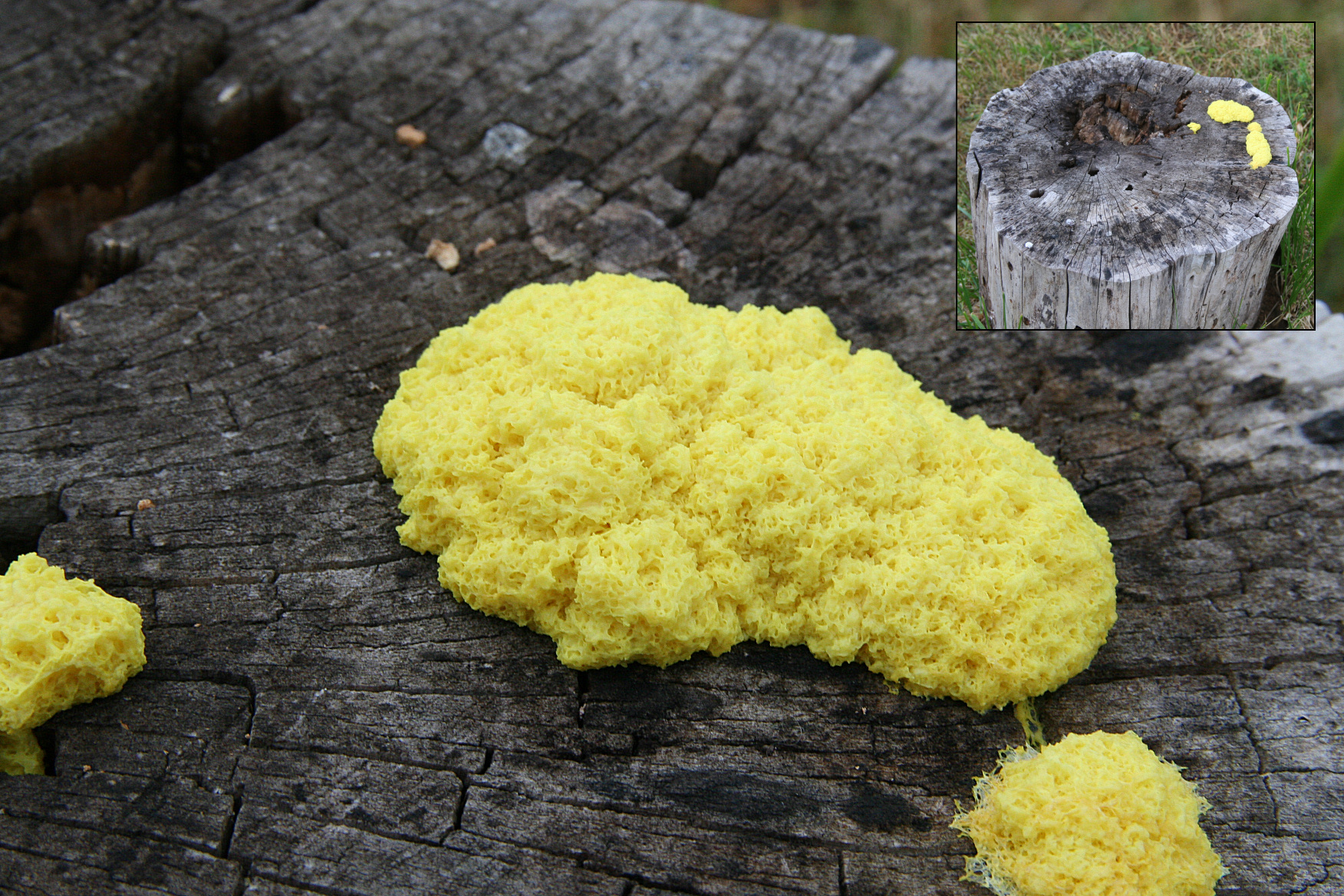 Myxomycète (à priori Fuligo septica =fleur de tan) sur un billot de bois.